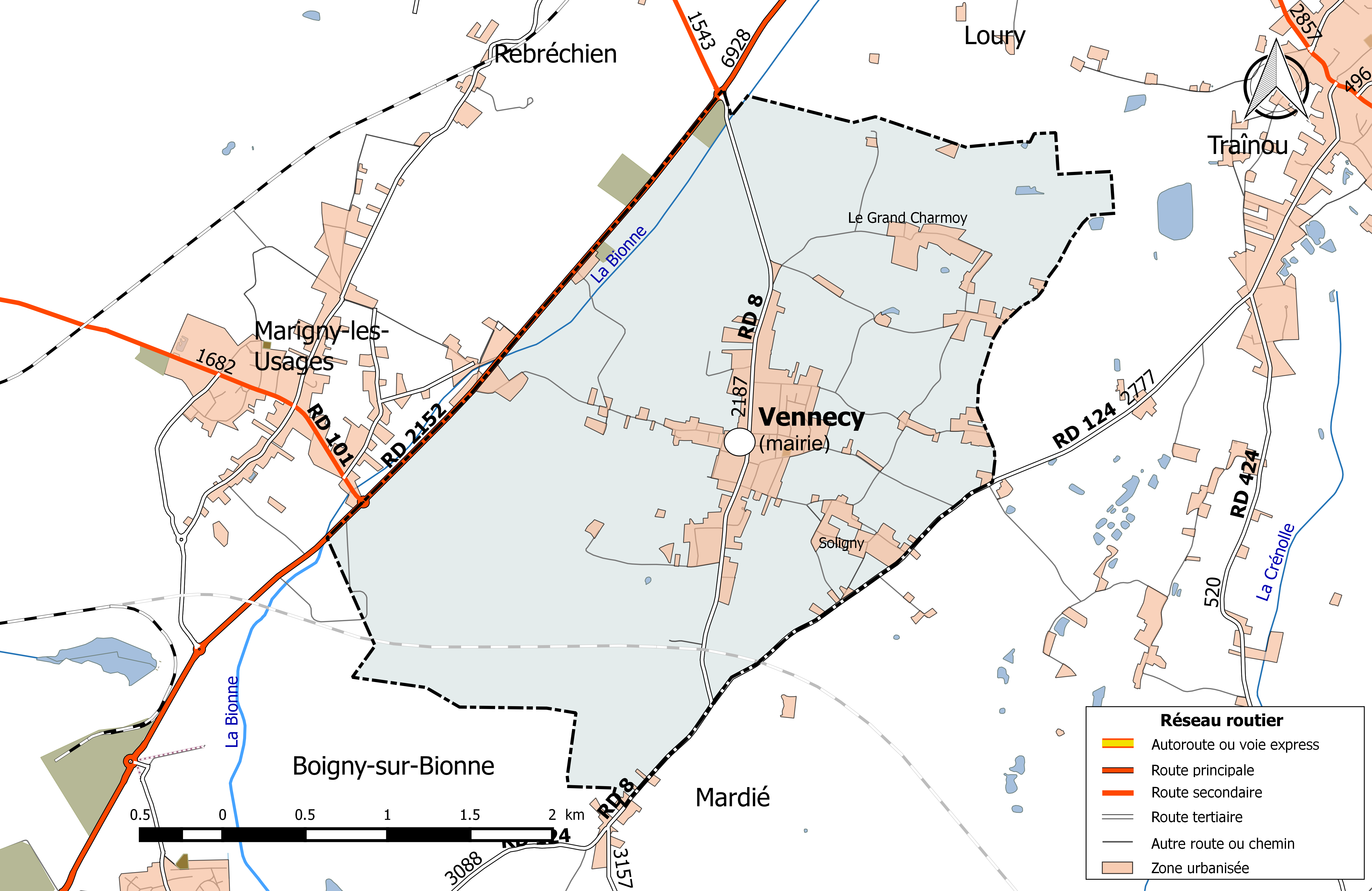 Carte du réseau routier de la commune de Vennecy.